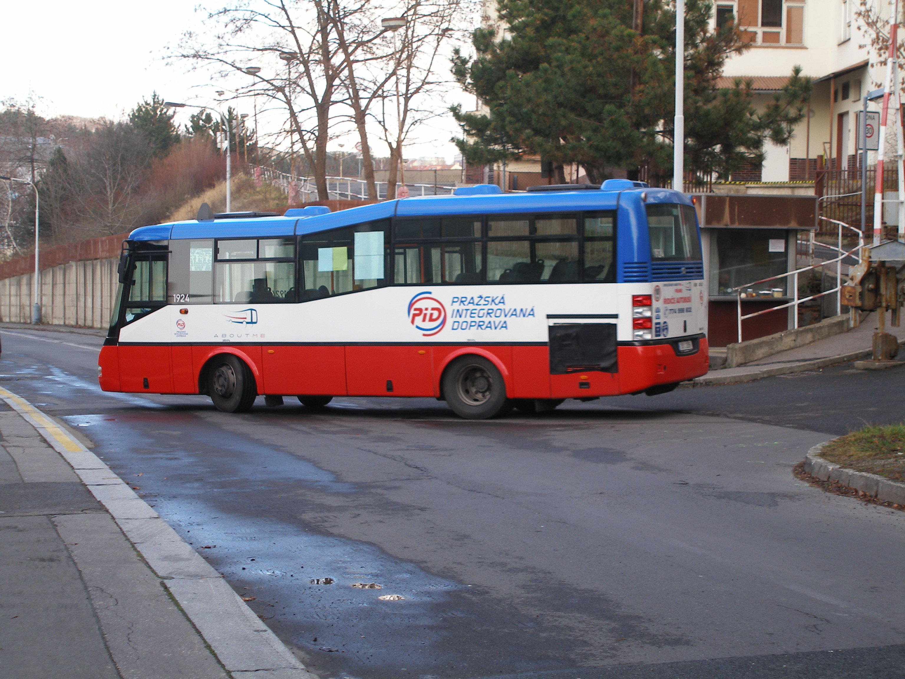 Pražský midibus na lince číslo 295.